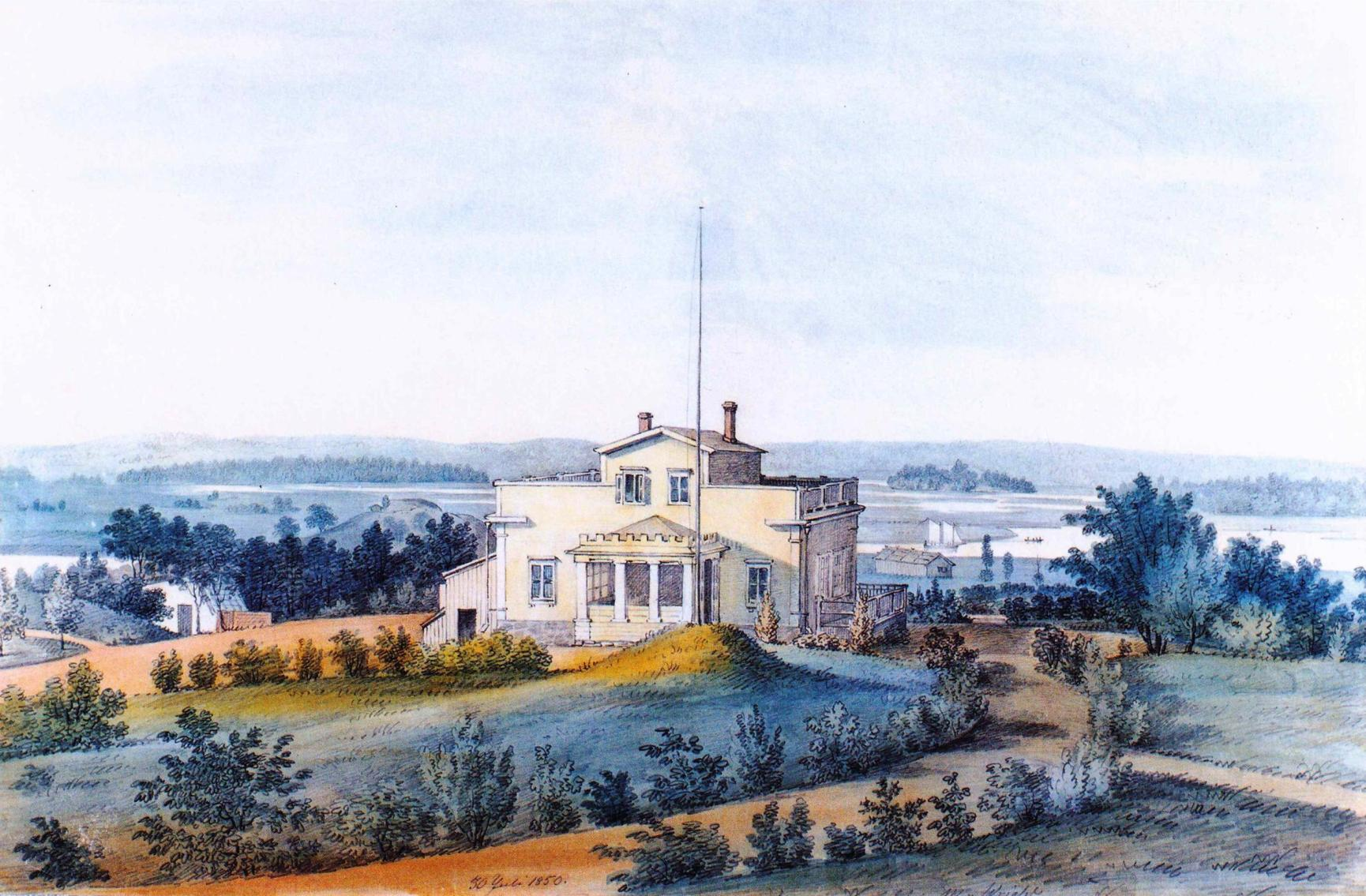 Annalan huvila Helsingin Vanhassakaupungissa, taustalla Vanhankaupunginlahtea. Teoksen omistaa Helsingin kaupunginmuseo.